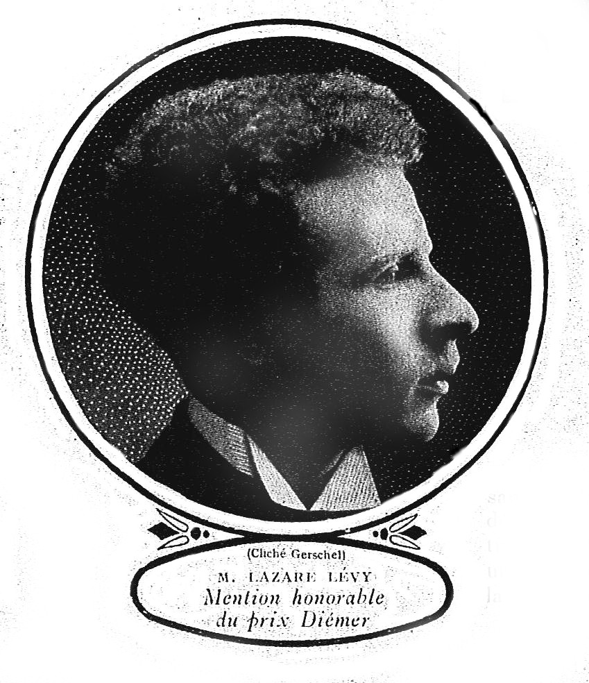 issu du fond iconographique d ela bibliothèque de reims.